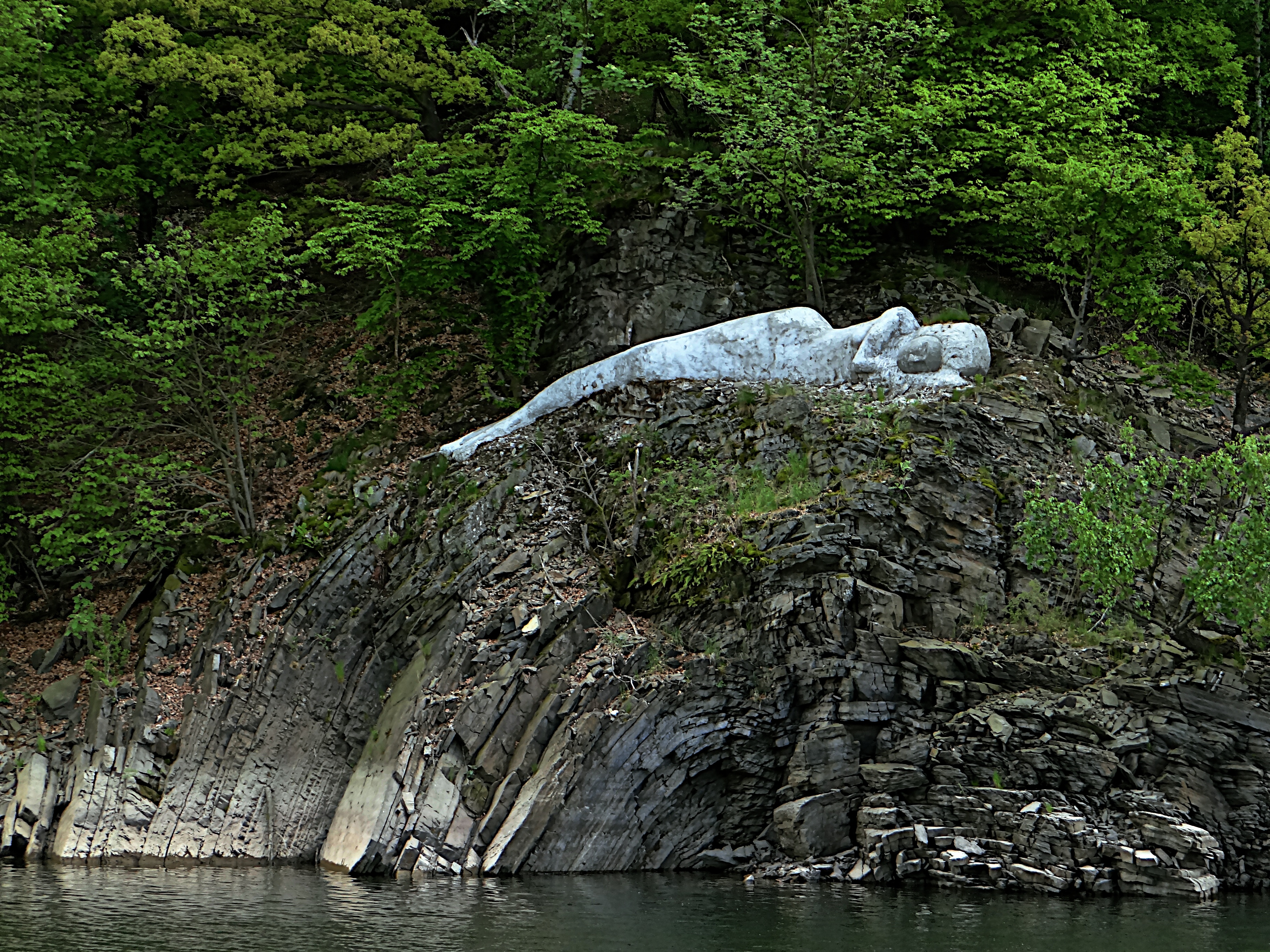 2012 wurde die fast 10 Tonnen schwere und mehr als 8 Meter lange Skulptur („Attania“) von Friedrich Freiburg aus Rönkhausen geschaffen und auf der Gilberginsel im Biggesee bei Attendorn platziert. Sie soll die „gute Nixe vom Biggeseee“ sein.